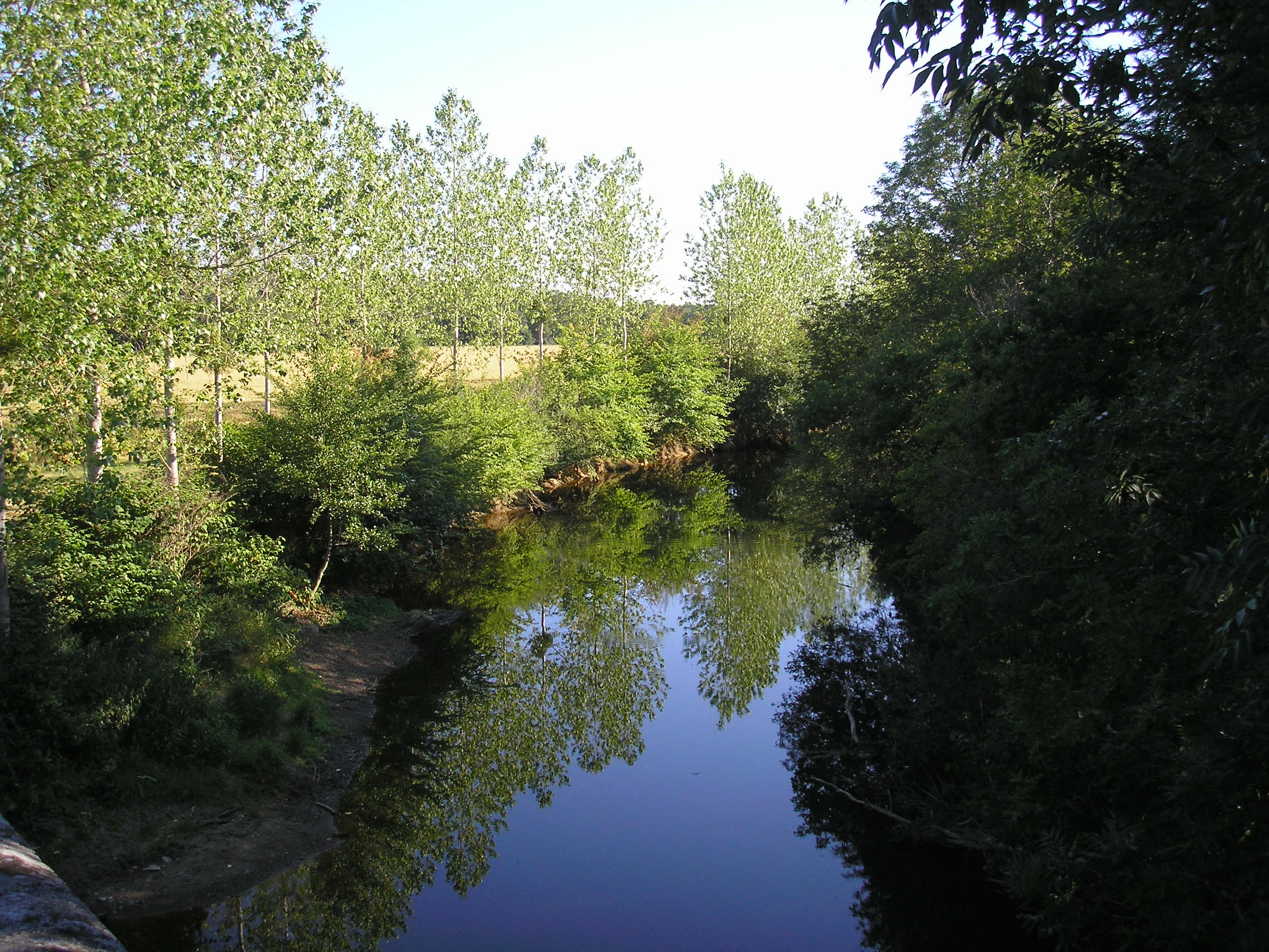 La Mayenne entre Thubœuf (Pays de la Loire, France), à gauche, et Haleine (Normandie, France), à droite.